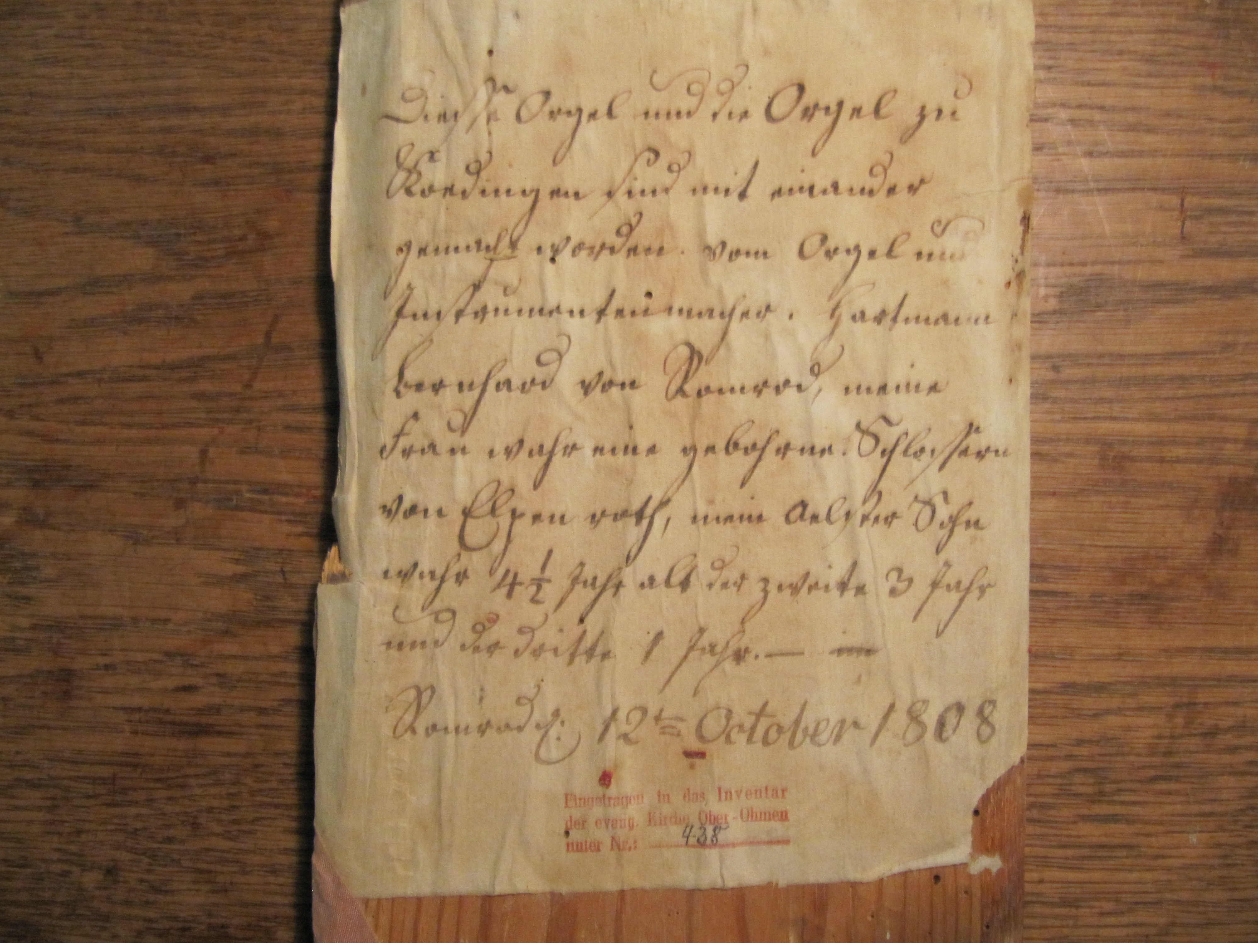 Johann Hartmann Bernhard: Record in his organ in Ober-Ohmen, District Vogelsbergkreis, Hesse, Germany: "Diesse Orgel und die Orgel zu Koedingen sind mit einander gemacht worden vom Orgel und Instrumentenmacher. Hartmann Bernhard von Romrod, meine Frau wahr eine gebohren. Schlossern von Elpenroth, mein aelster Sohn wahr 4½ Jahr alt der zweite 3 Jahr und der dritte 1 Jahr. -- Romrod den 12ten October 1808"